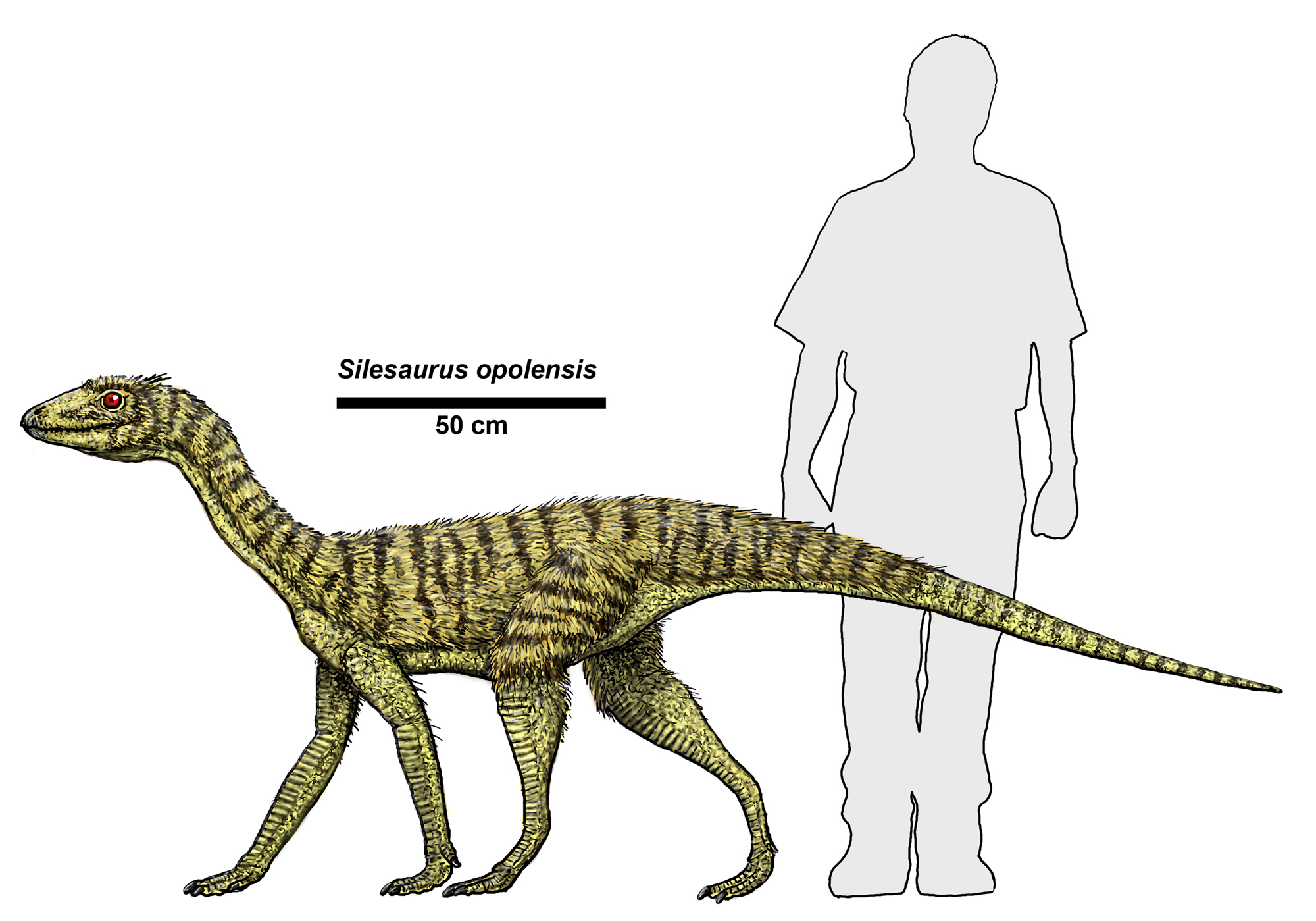 Credit Dr. Jeff Martz/NPS